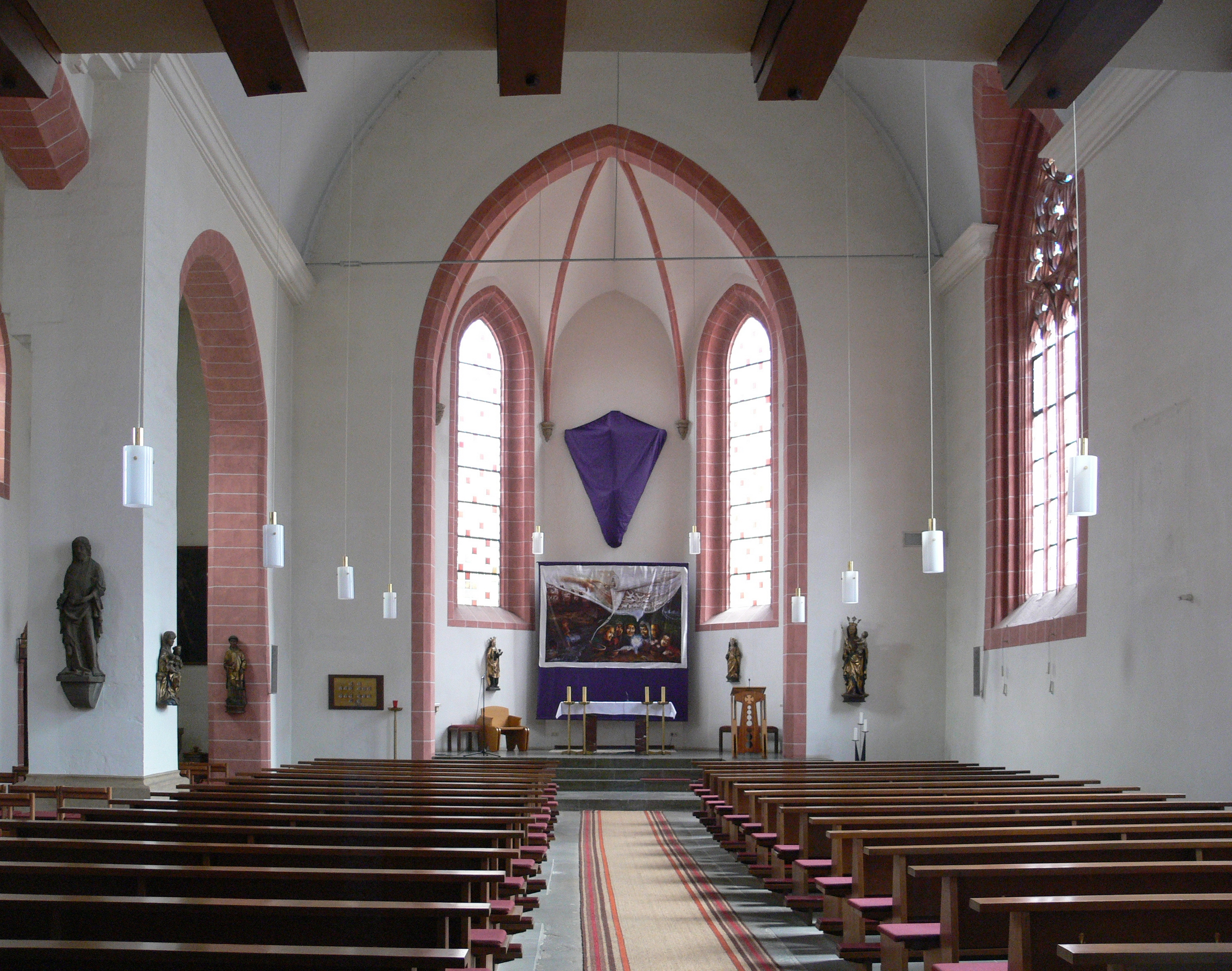 Erfurt, Lorenzkirche Innenansicht (mit verhängtem Altar und Kruzifix in der Passionszeit)